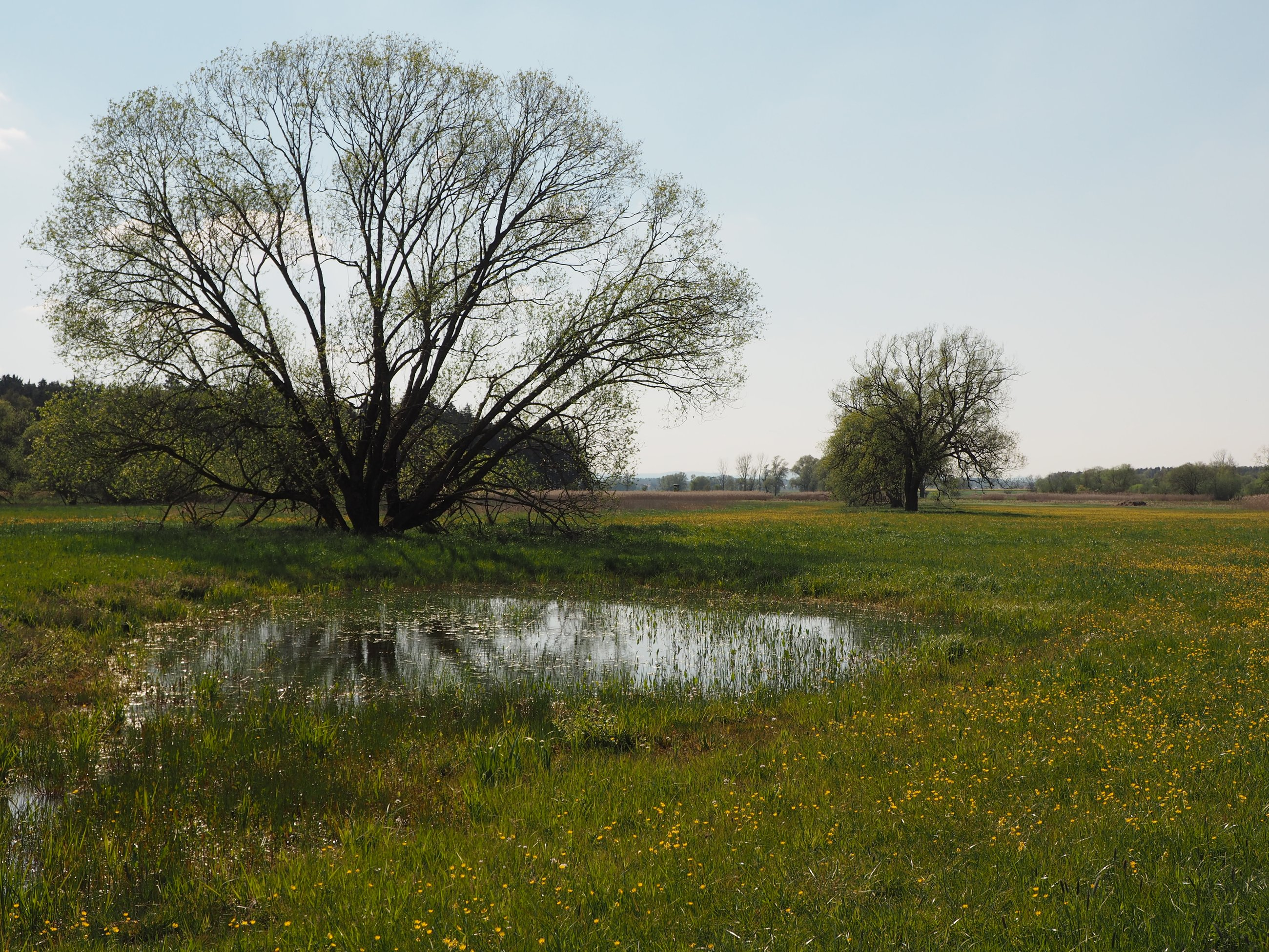 Weg am Doosbach